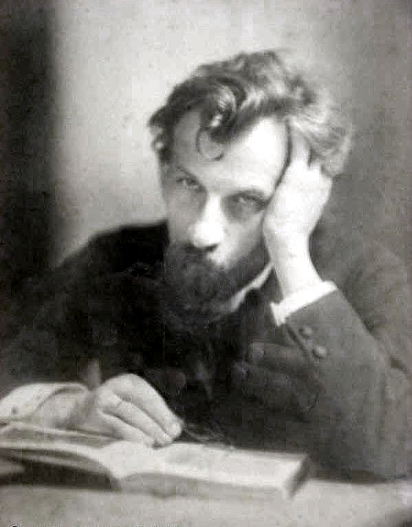 Hans Pfitzner by Wanda von Debschitz-Kunowski, ca 1910, ca. 21 x 16.5cm